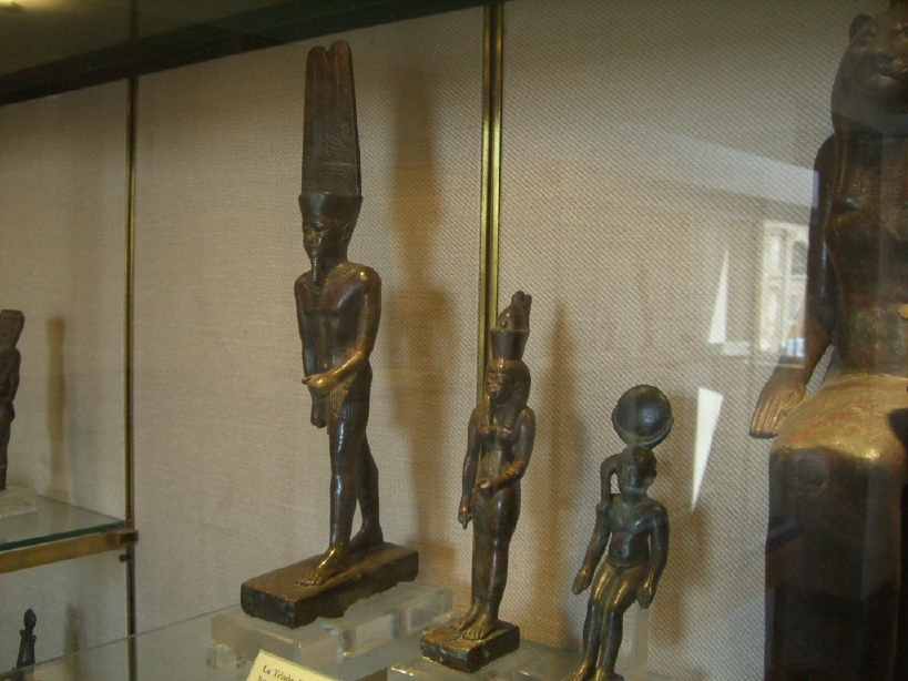 Statuettes en bronze de la triade thébaine. De gauche à droite : le dieu Amon-Rê, la déesse Mout et leur fils le dieu Khonsou - Basse époque - Museo Gregoriano du Vatican - Rome